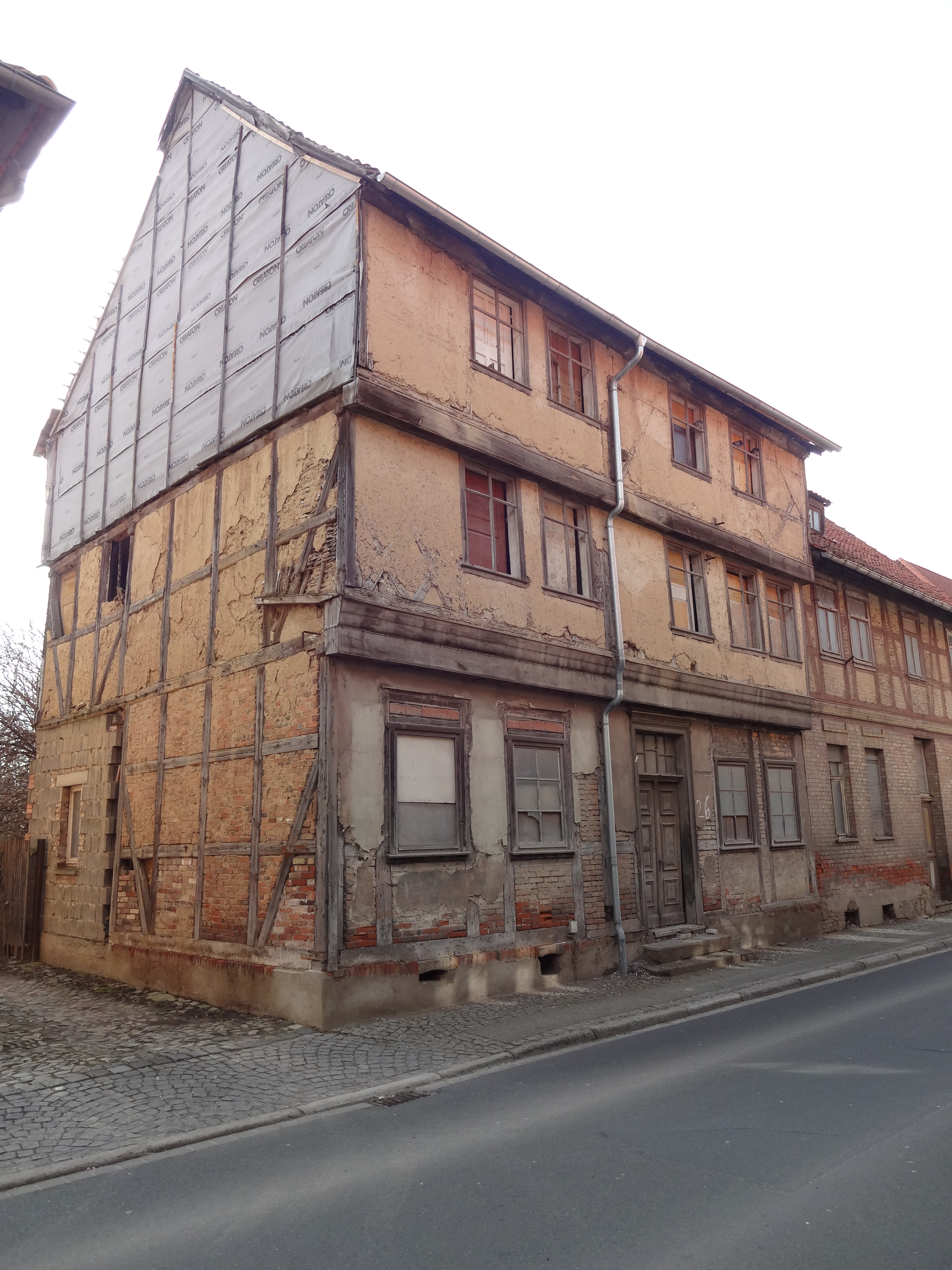 denkmalgeschütztes Fachwerkhaus in der Halberstädter Straße 26 in Derenburg, Ortsteil von Blankenburg (Harz)